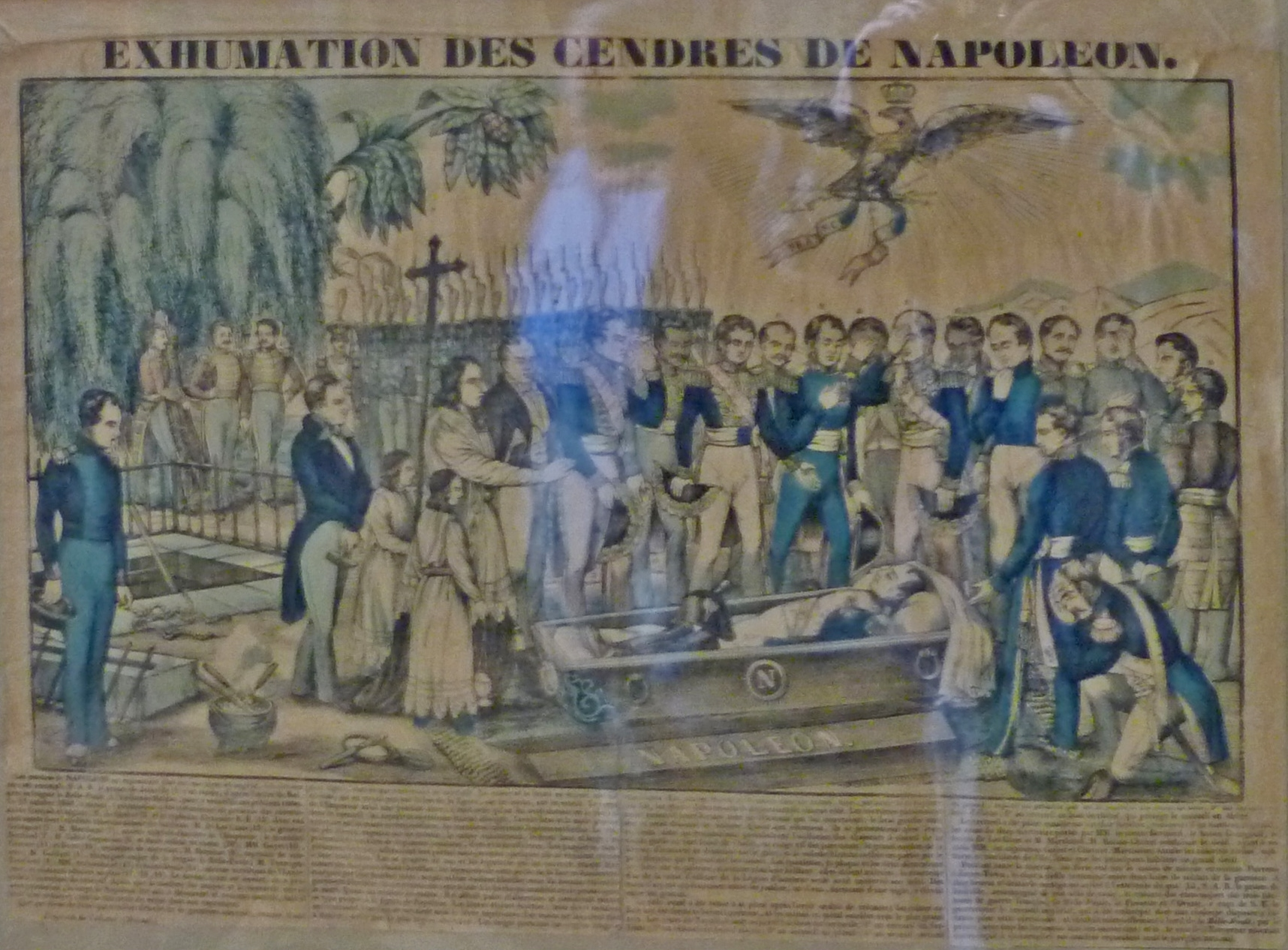 Exhumation des cendres de Napoléon I; auteur : anonyme; exhibition au château de Baume, France